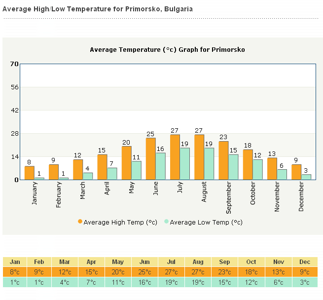 Kлимат в Приморско, България